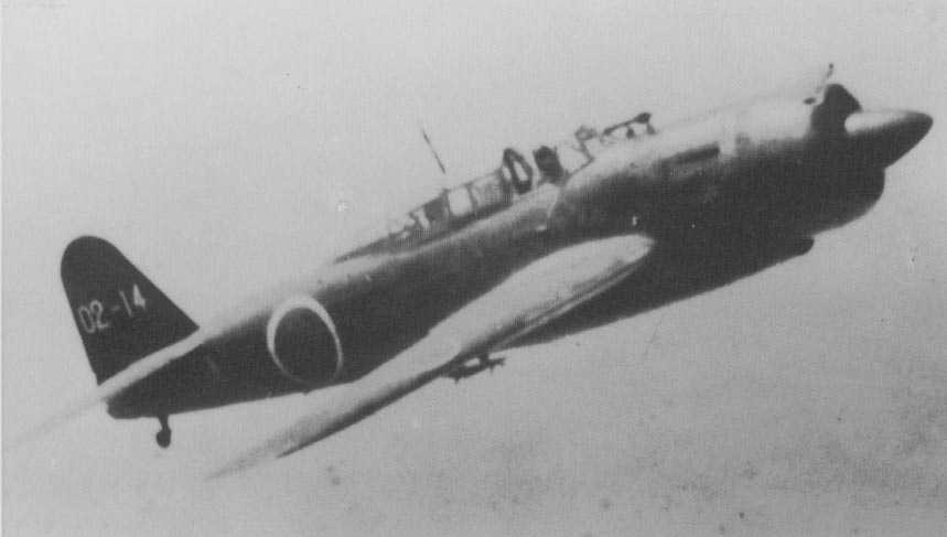 A Yokosuka D4Y3 Type 33 "Suisei" in flight.